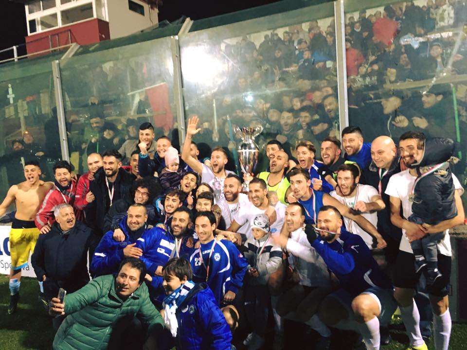 Portici Campione